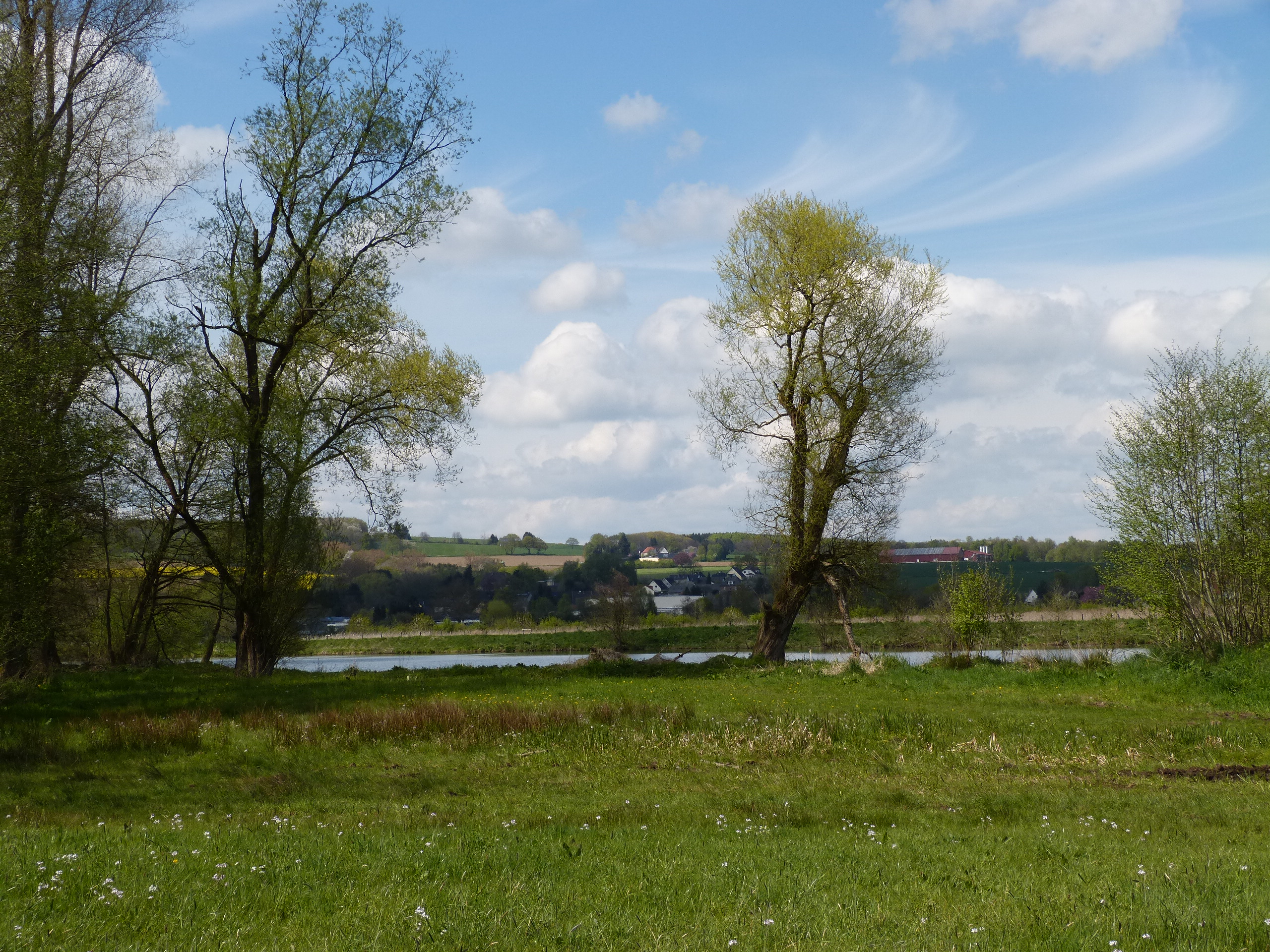 Wiese „Heide“ an der Ruhr in Menden, Blick auf Fröndenberg; der Bereich im Vordergrund gehört zum Naturschutzgebiet „Auf dem Stein“ (Menden); auf der gegenüberliegenden Ruhrseite im Hintergrund befindet sich das NSG „Kiebitzwiese“ (Fröndenberg)